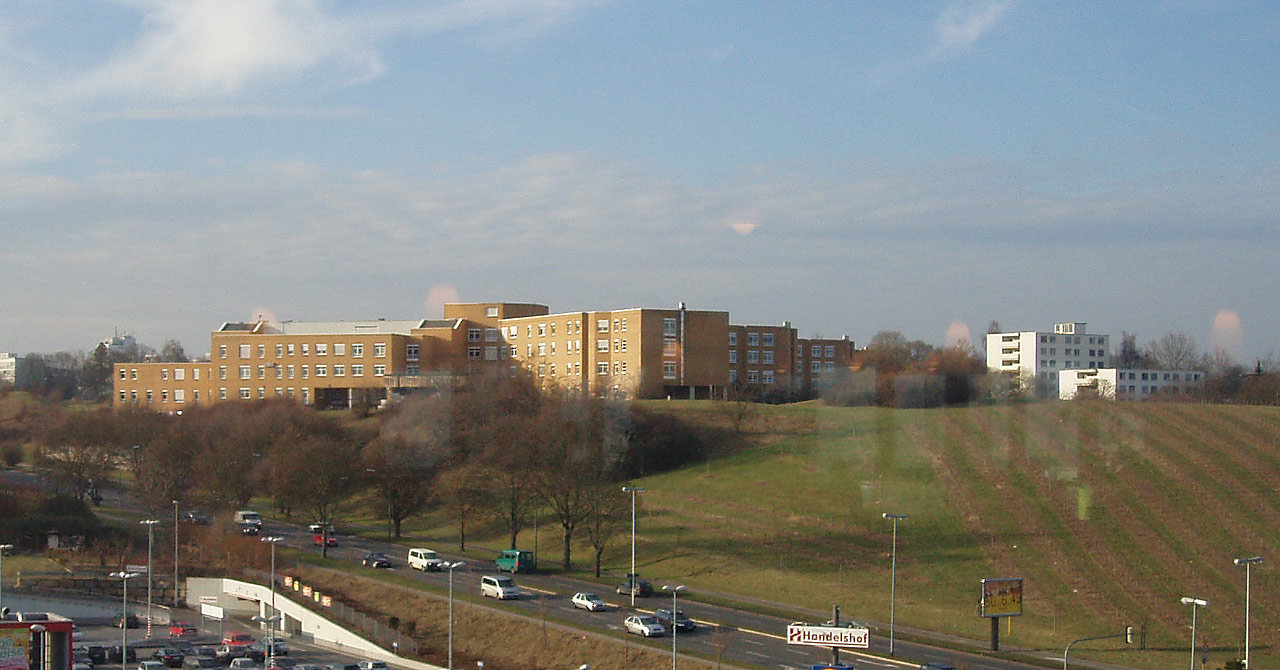 Klinik am Gesundbrunnen in Heilbronn